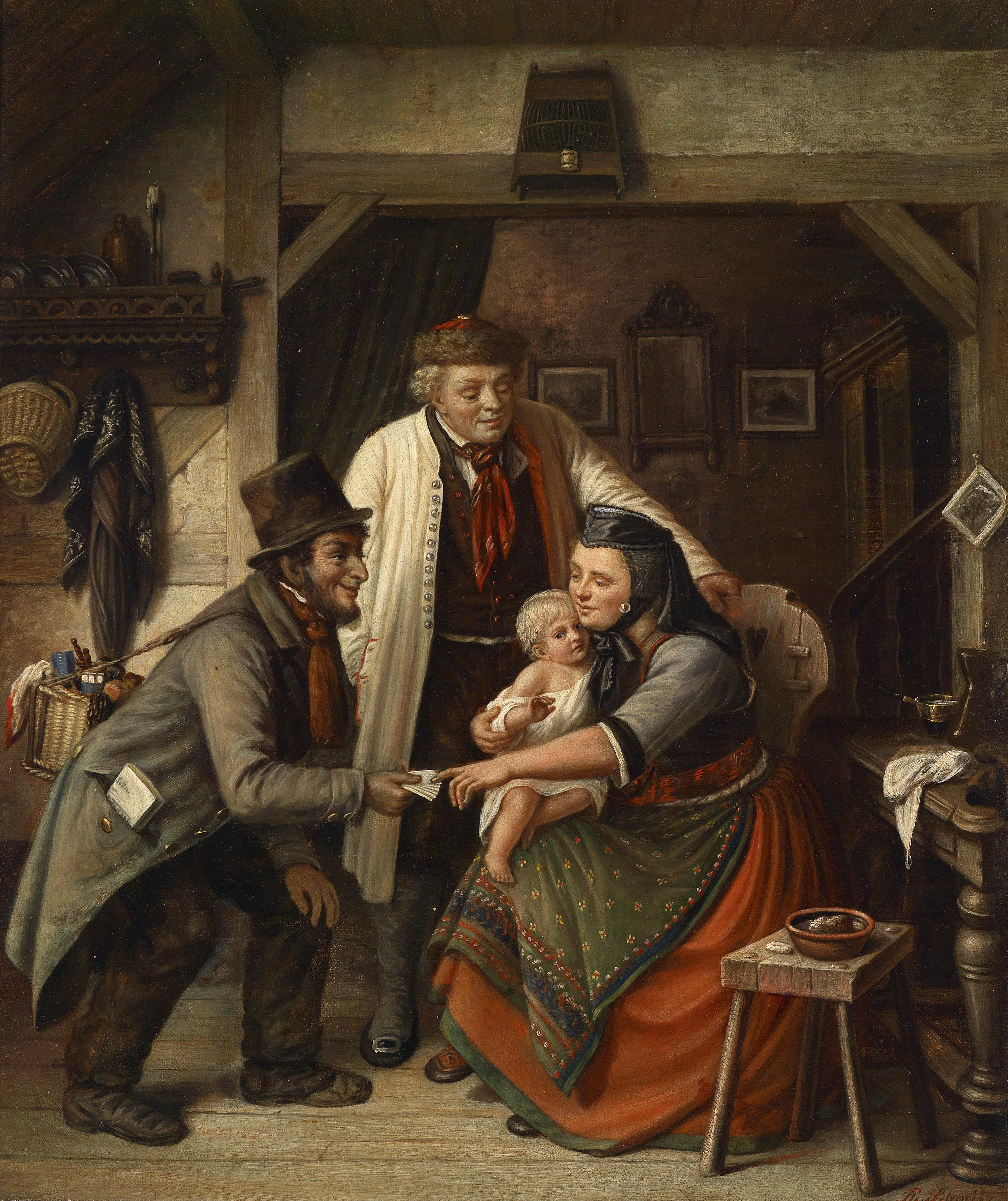 Der Losverkäufer, signiert Ph. Schmitz, Öl auf Leinwand, 50,5x 43 cm